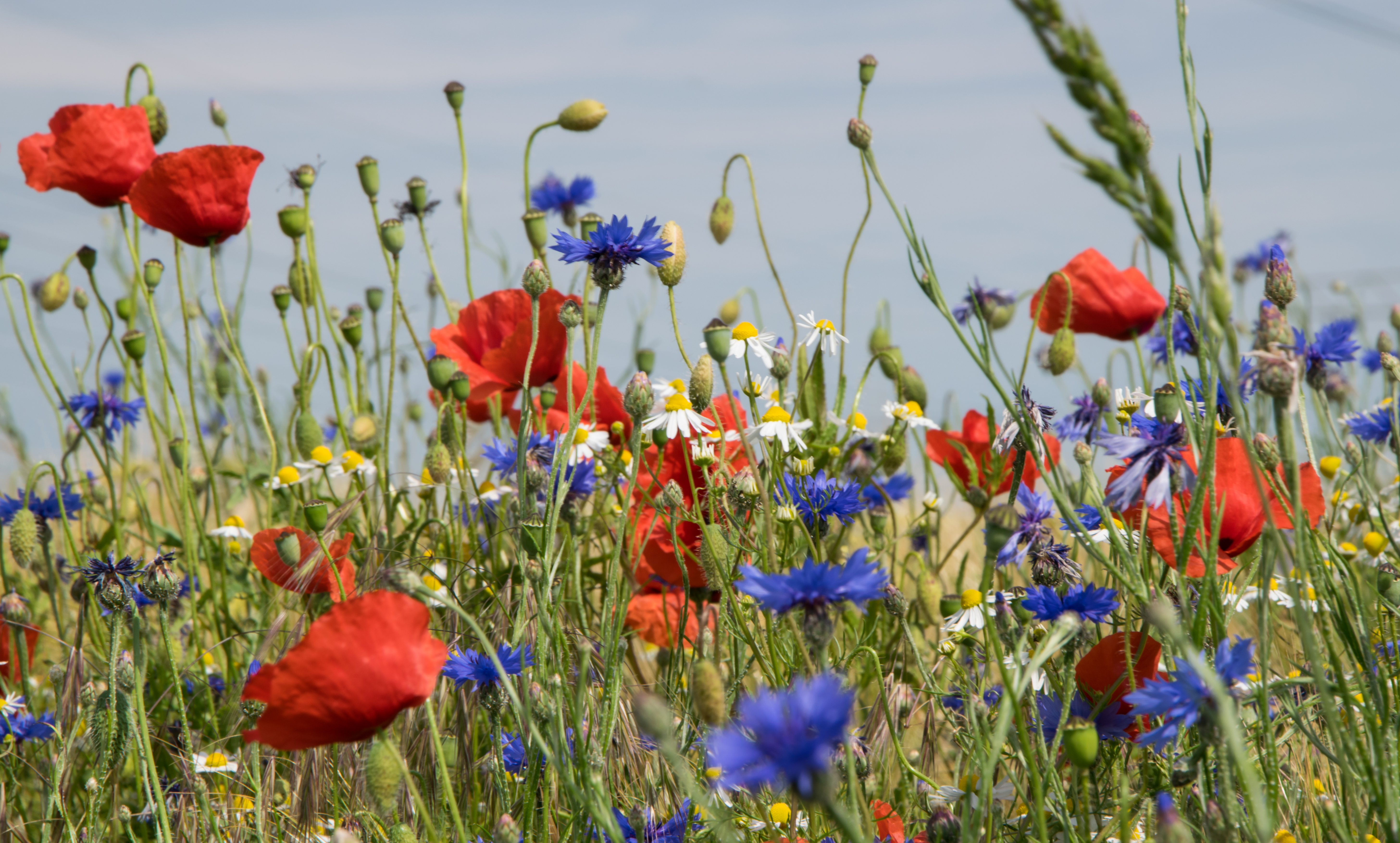 Mohn Kornblume und Hundskamille an einem Feld